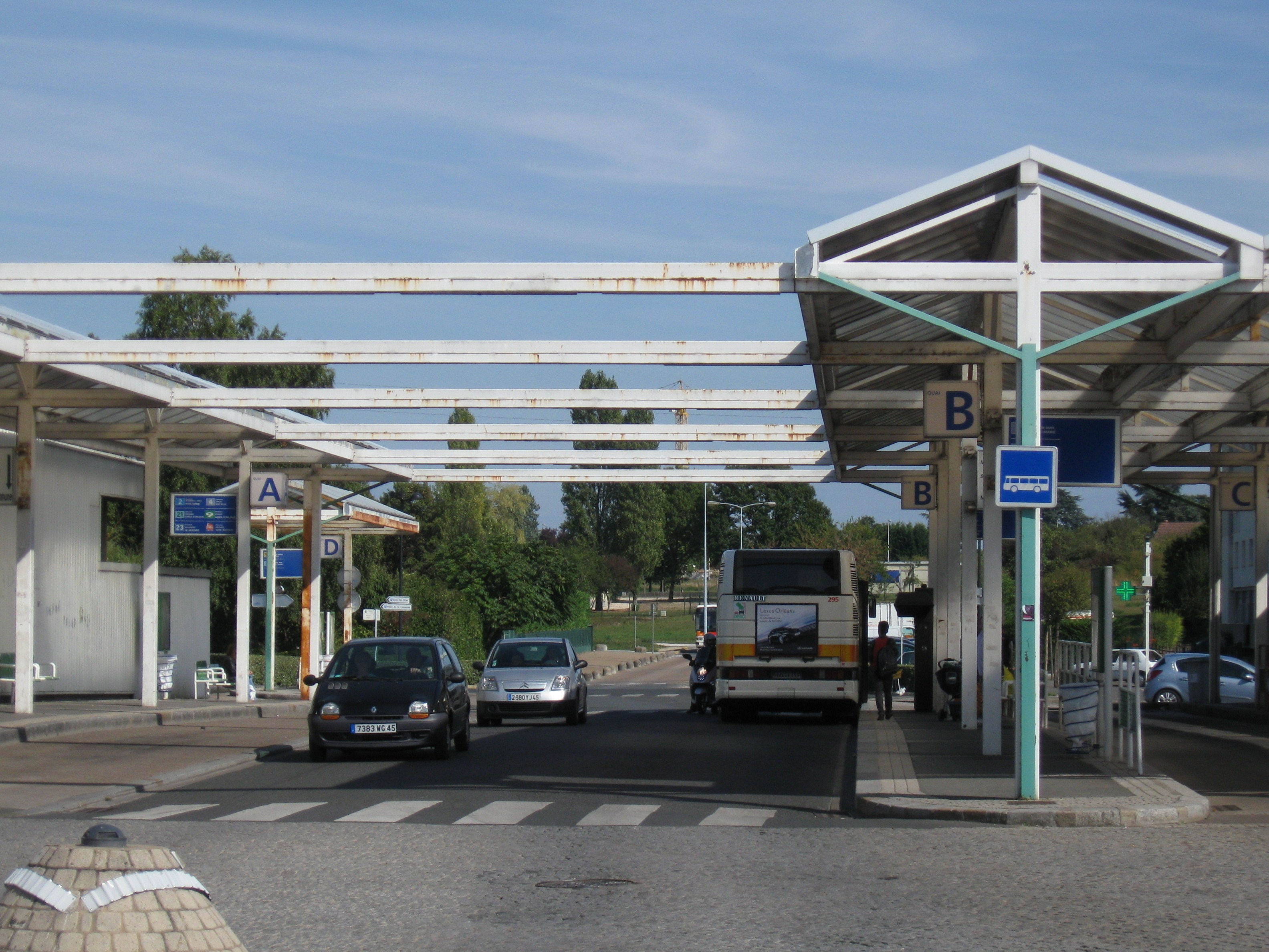 Point bus Léon Blum, Saint-Jean-de-Braye, Loiret, France